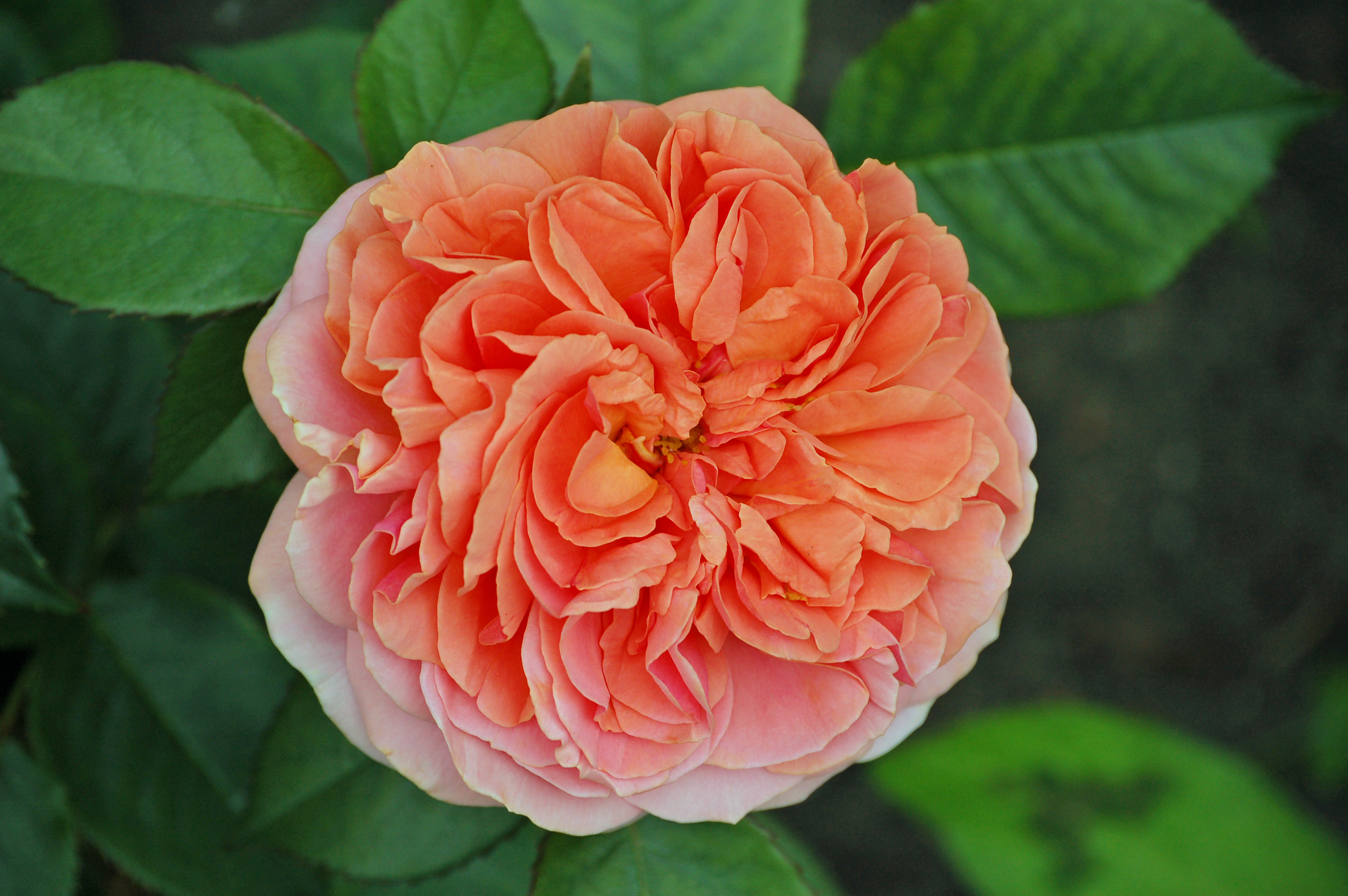 Tee-Hybride "Chippendale" (Tantau 2005)